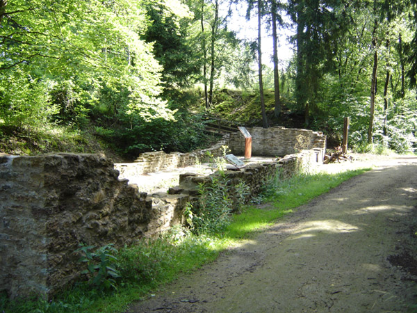 Iess- & Openthaltsraum. Allgemenges zum Bild: Dëst Bild weist den Iess- & Openthaltsraum vun der fréierer Miniéresbunn um Bielesser Gaalgebierg.